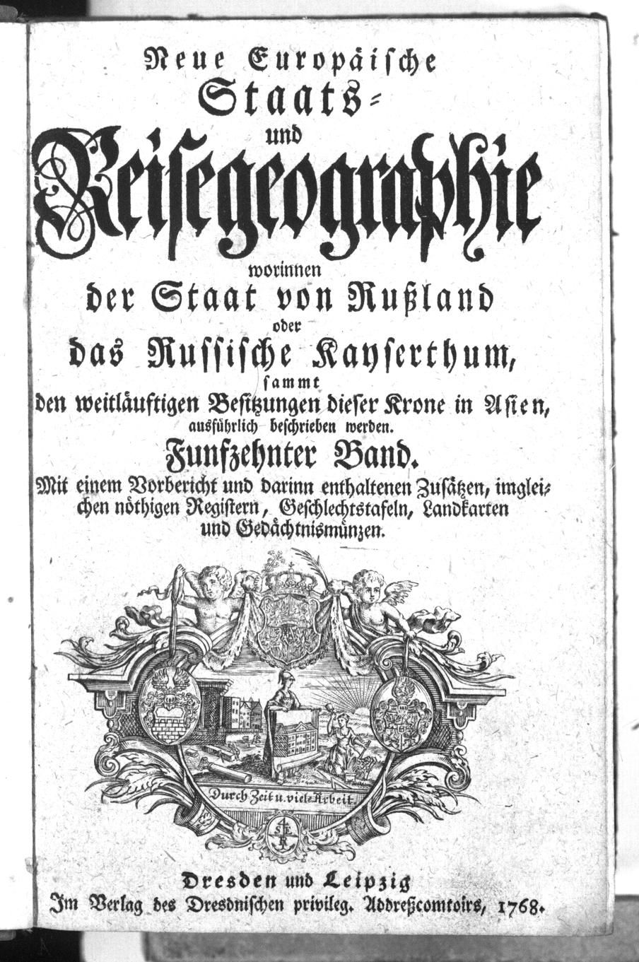 Karl Gottlob Dietmann und Johann Christoph Adelung: Neue europäische Staats- und Reisegeographie worinnen der Staat von Rußland oder das Russische Kayserthum sammt den weitläufigen Besitzungen dieser Krone in Asien, ausführlich beschrieben wird. Fünfzehnter Band. Mit einem Vorbericht und darinn enthaltenen Zusätzen, imgleichen nöthigen Registern, Geschlechtstafeln, Landkarten und Gedächtnismünzen. Im Verlag des privilegirten Addreßcomptoirs, Dresden und Leipzig 1768 Digitalisat in der ULB Münster